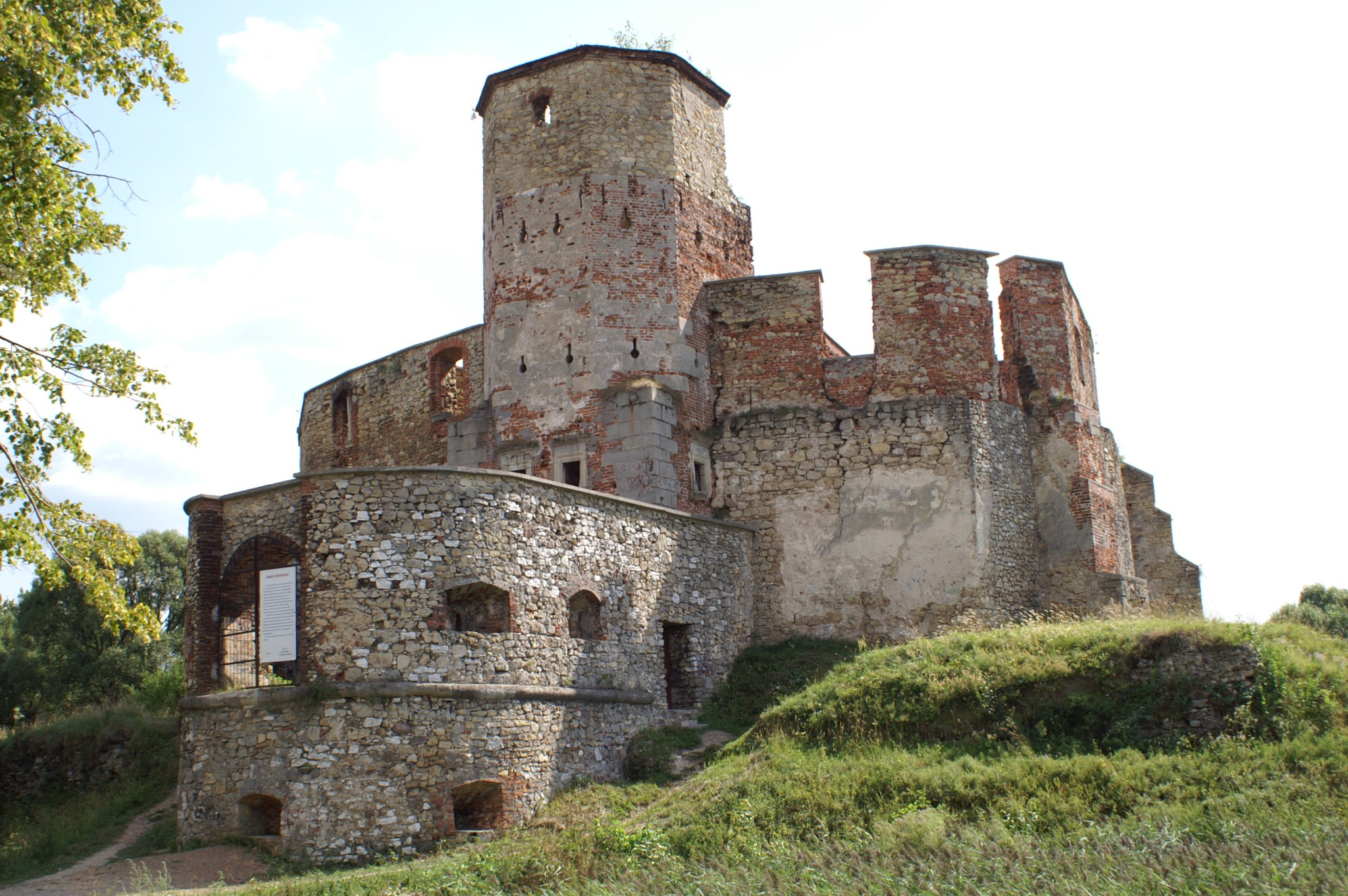 Castle in Siewierz - Poland